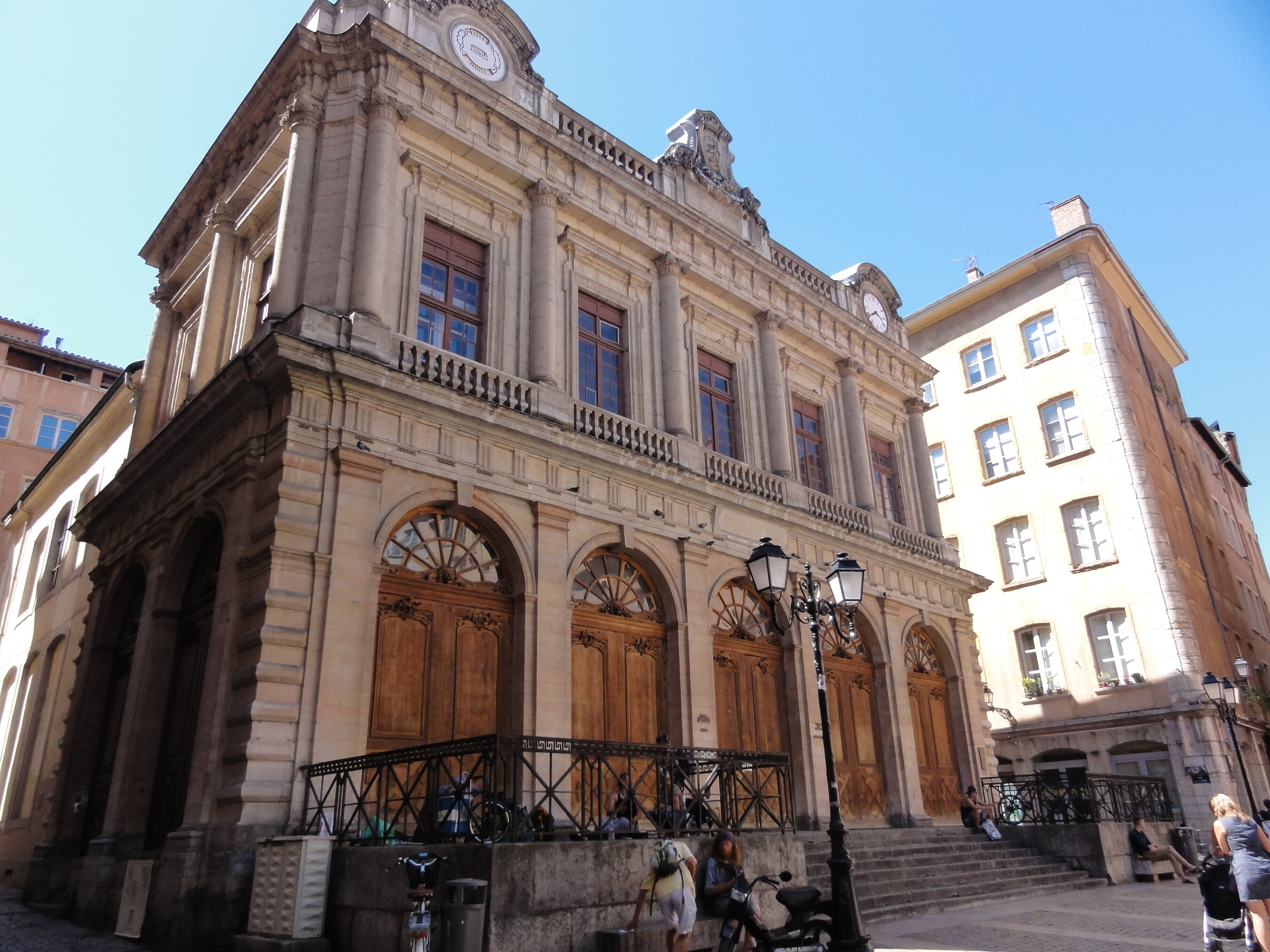 Le Temple du Change - Lyon